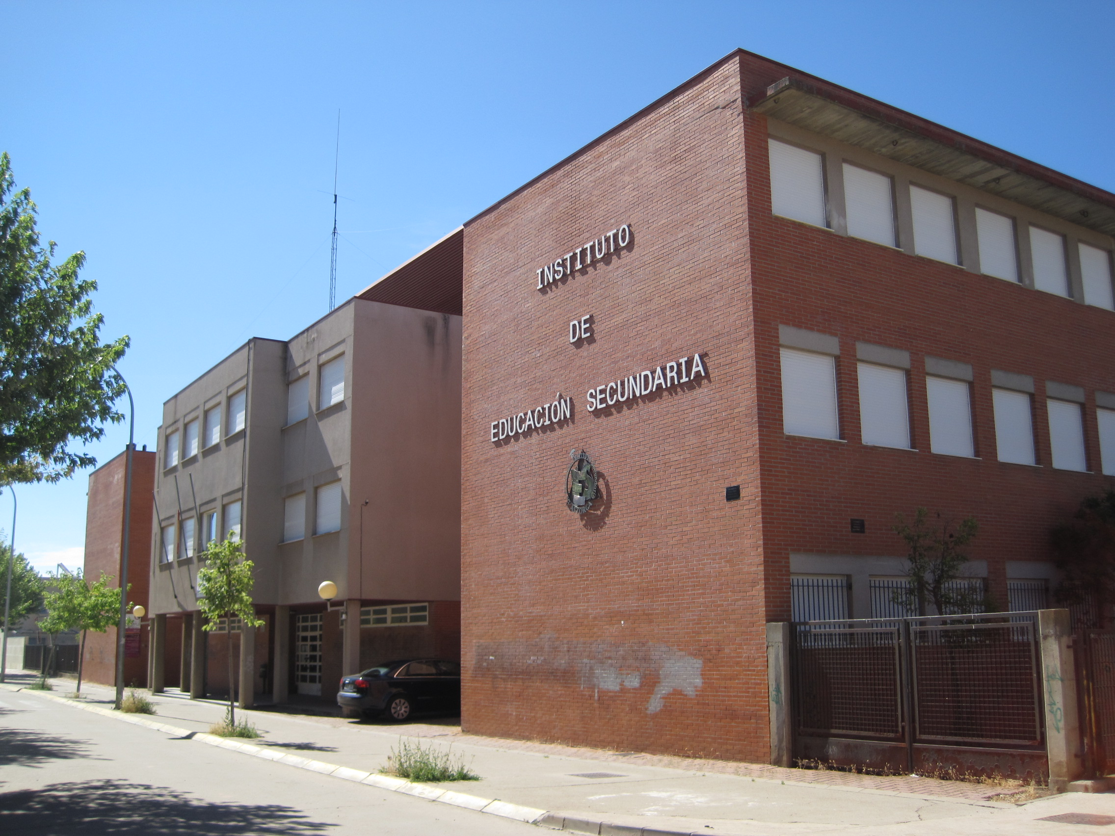 Instituto de Educación Secundaria de Astorga (León, España).